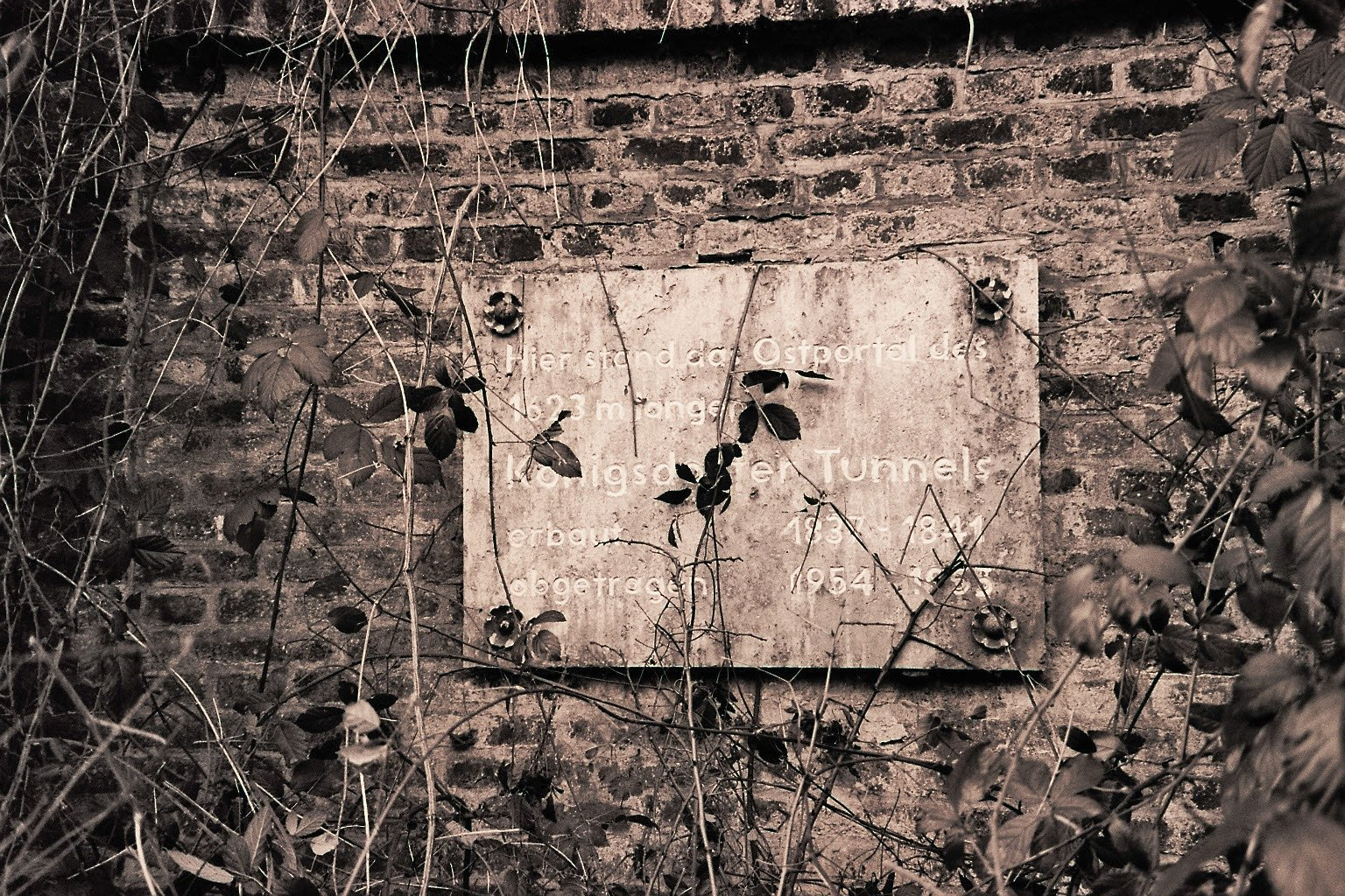 Gedenktafel am Königsdorfer Tunnel, einem der ersten Eisenbahntunnels Deutschland